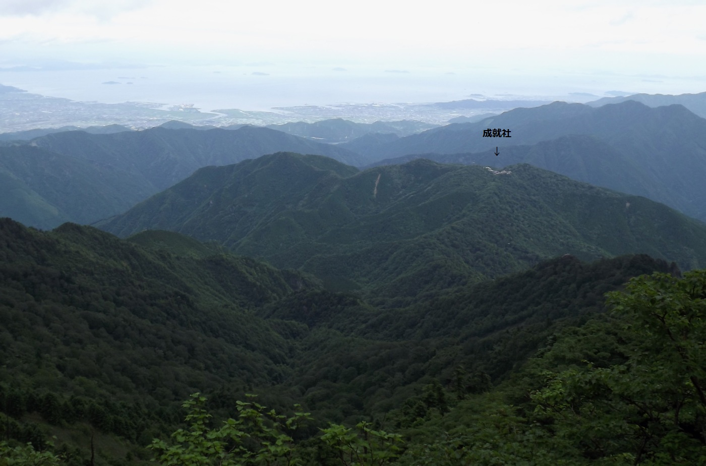 前神寺の常住社